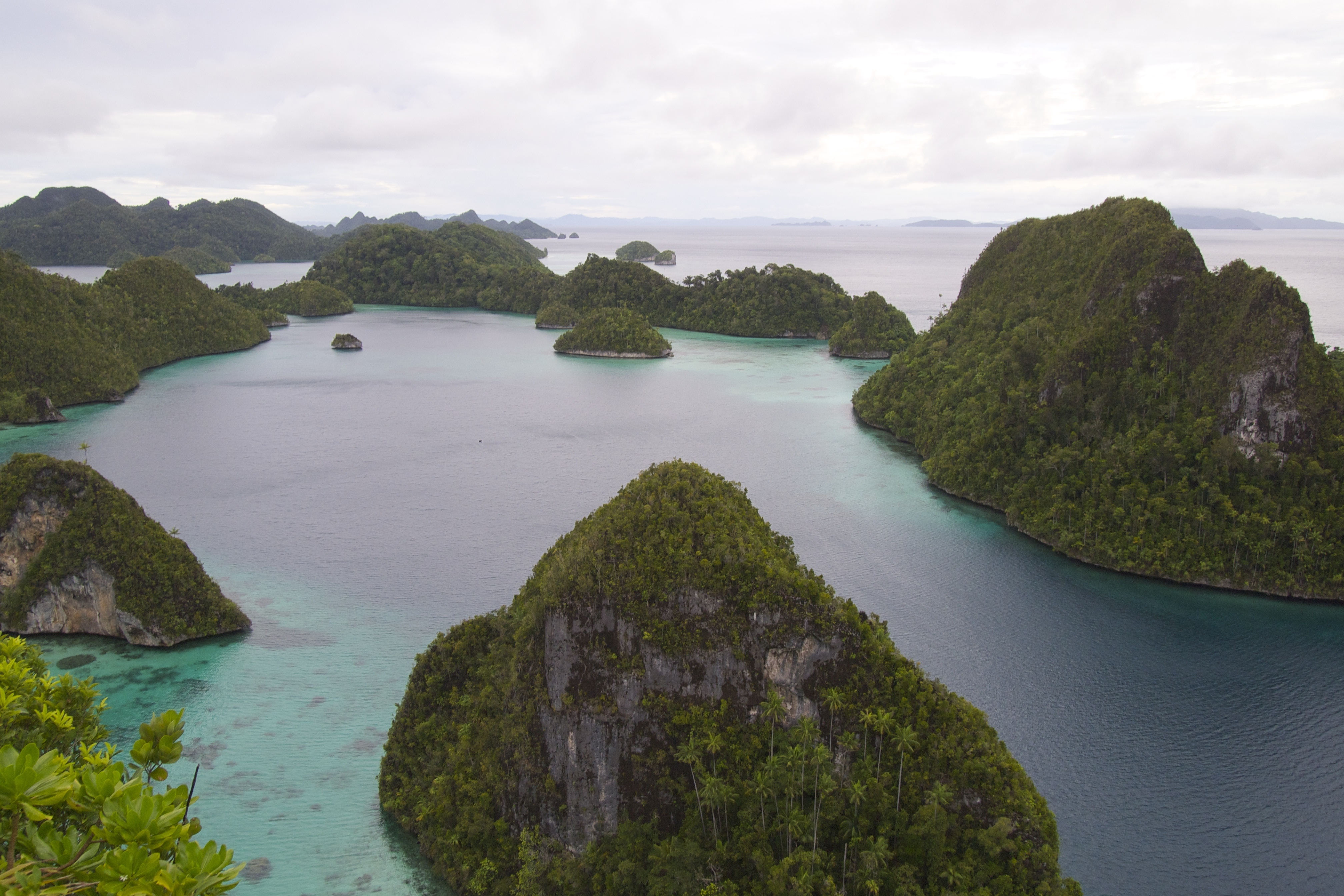 Wayag Island, Raja Ampat